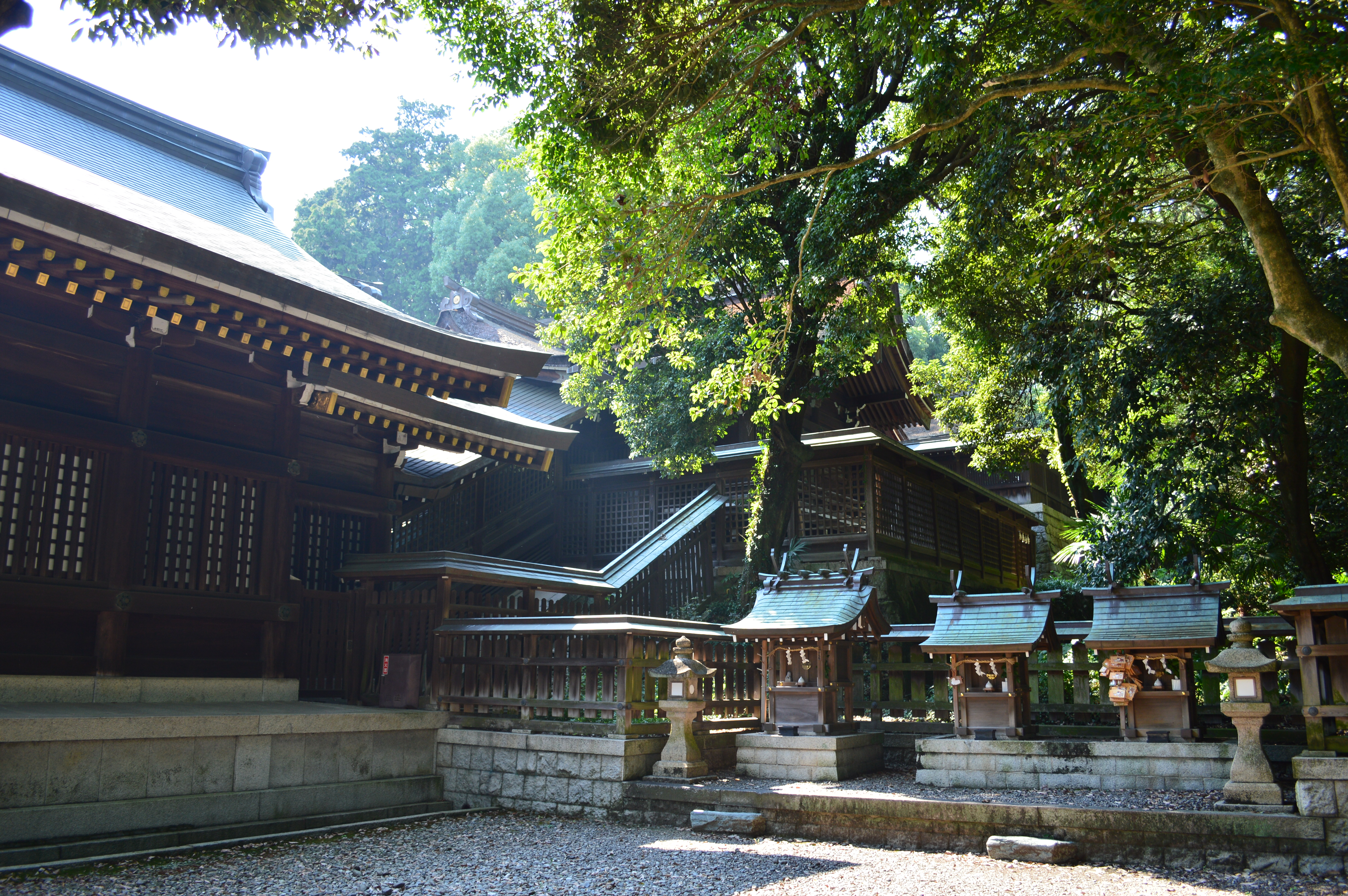 竃山神社 社殿